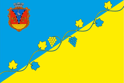 Прапор Арциза